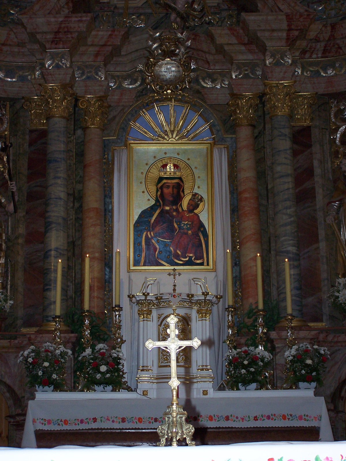 Római katolikus templom, volt pálos templom (Márianosztra, Rákóczi tér) This is a photo of a monument in Hungary. Identifier: 7122